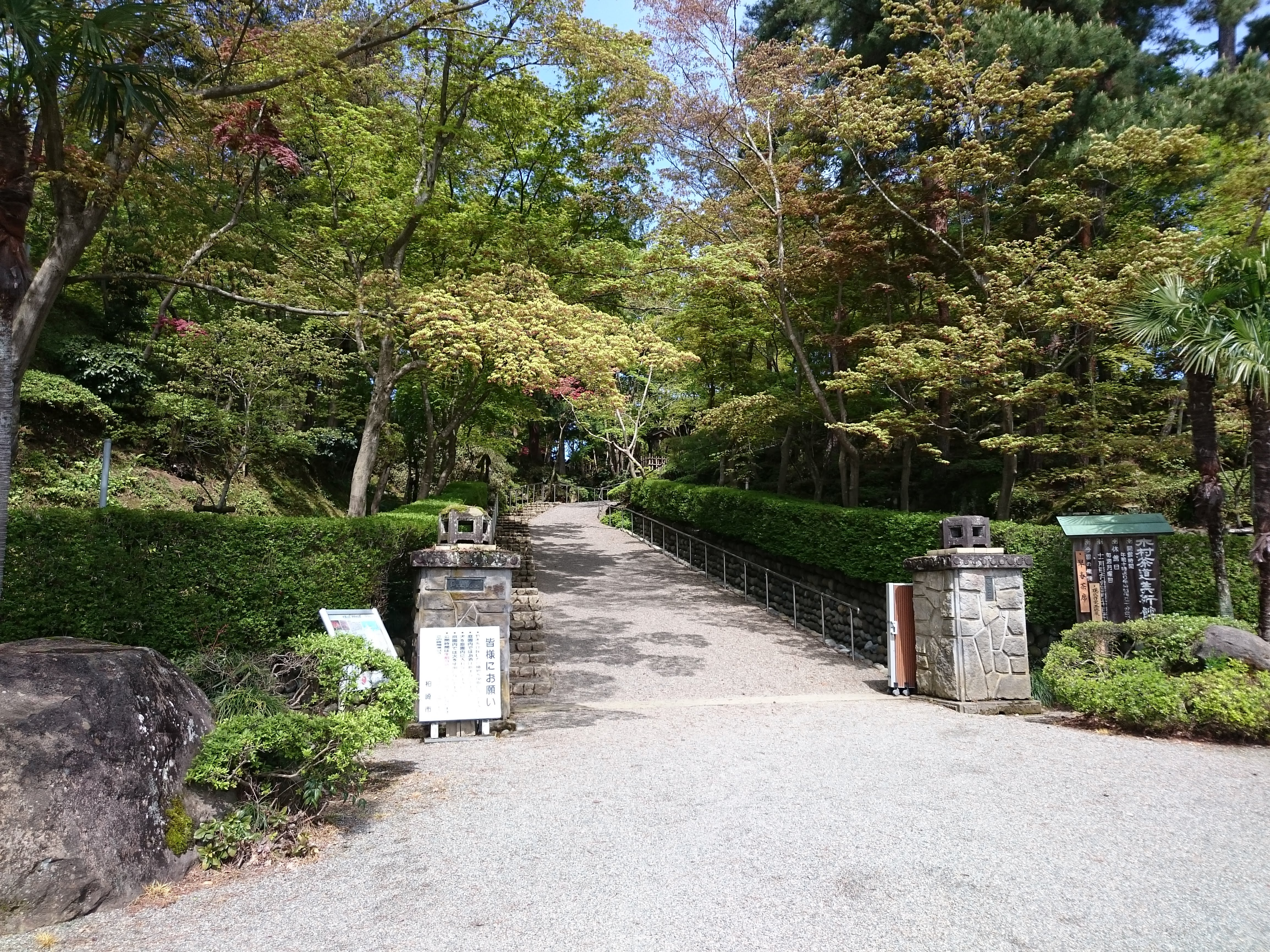 木村茶道美術館の入口